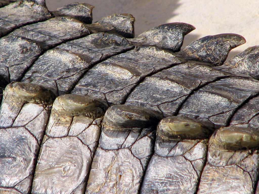 Crocodile's skin_0568